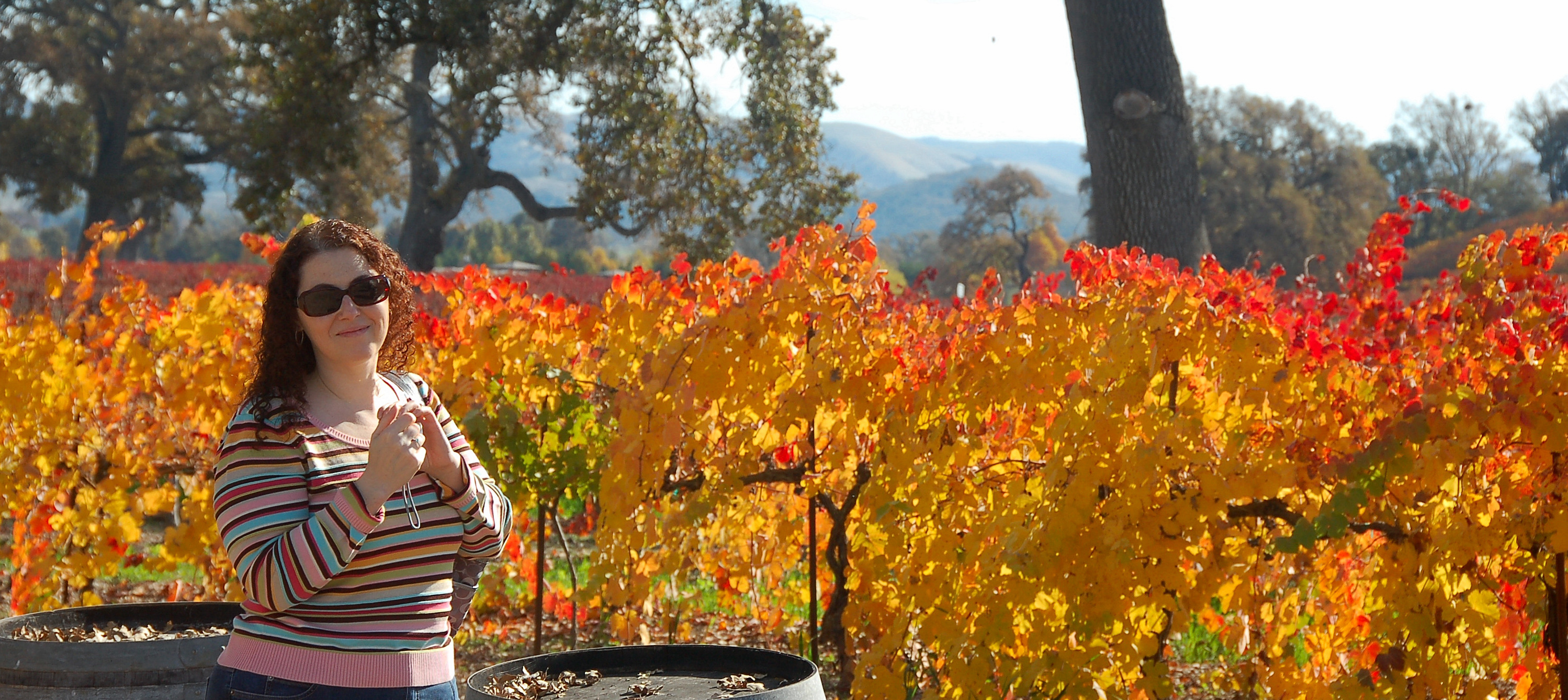 fall colors